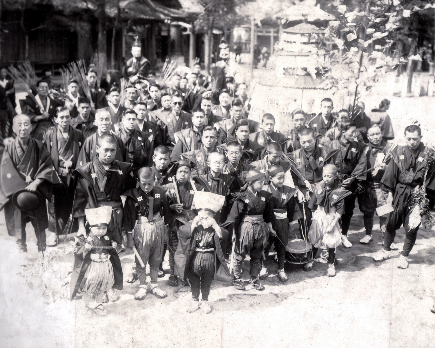 matubayashi(松囃子) people and kasahoko(傘鉾), Fukuoka, Japan